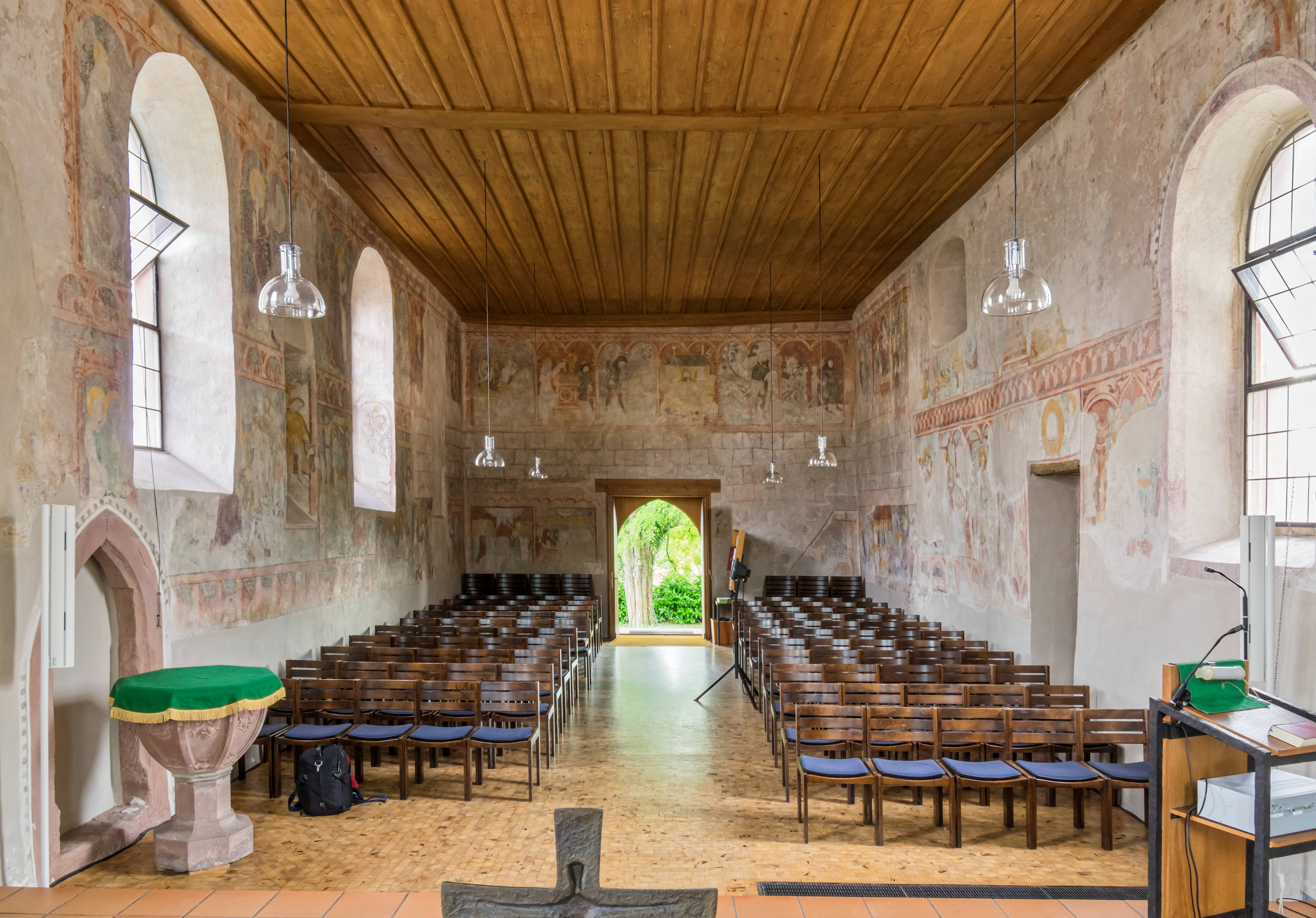 Bilder aus der evangelischen Kirche in Fischingen Der Innenraum mit Fresken aus dem 15. Jahrhundert